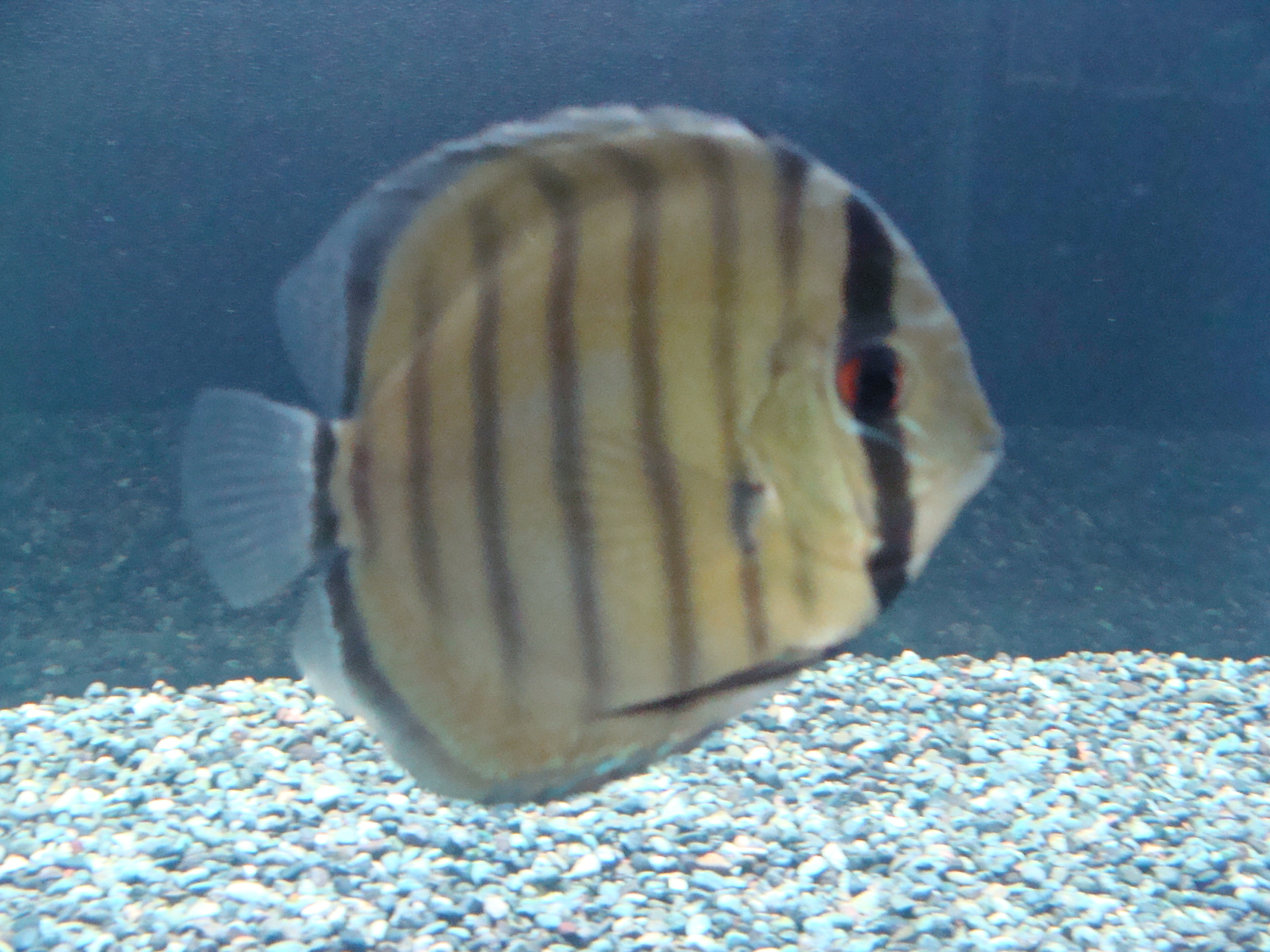 中文（台灣）: 熱帶魚002